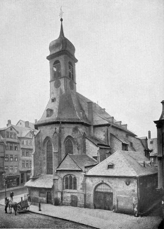 Peterskirche in Frankfurt am Main vor dem Abbruch 1891.jpg